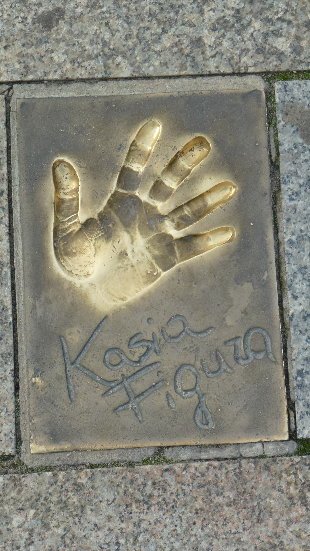 Odcisk gwiazdy na ul. Aleji Gwiazd w Międzyzdrojach woj. zachodniopomorskie pow. kamieński